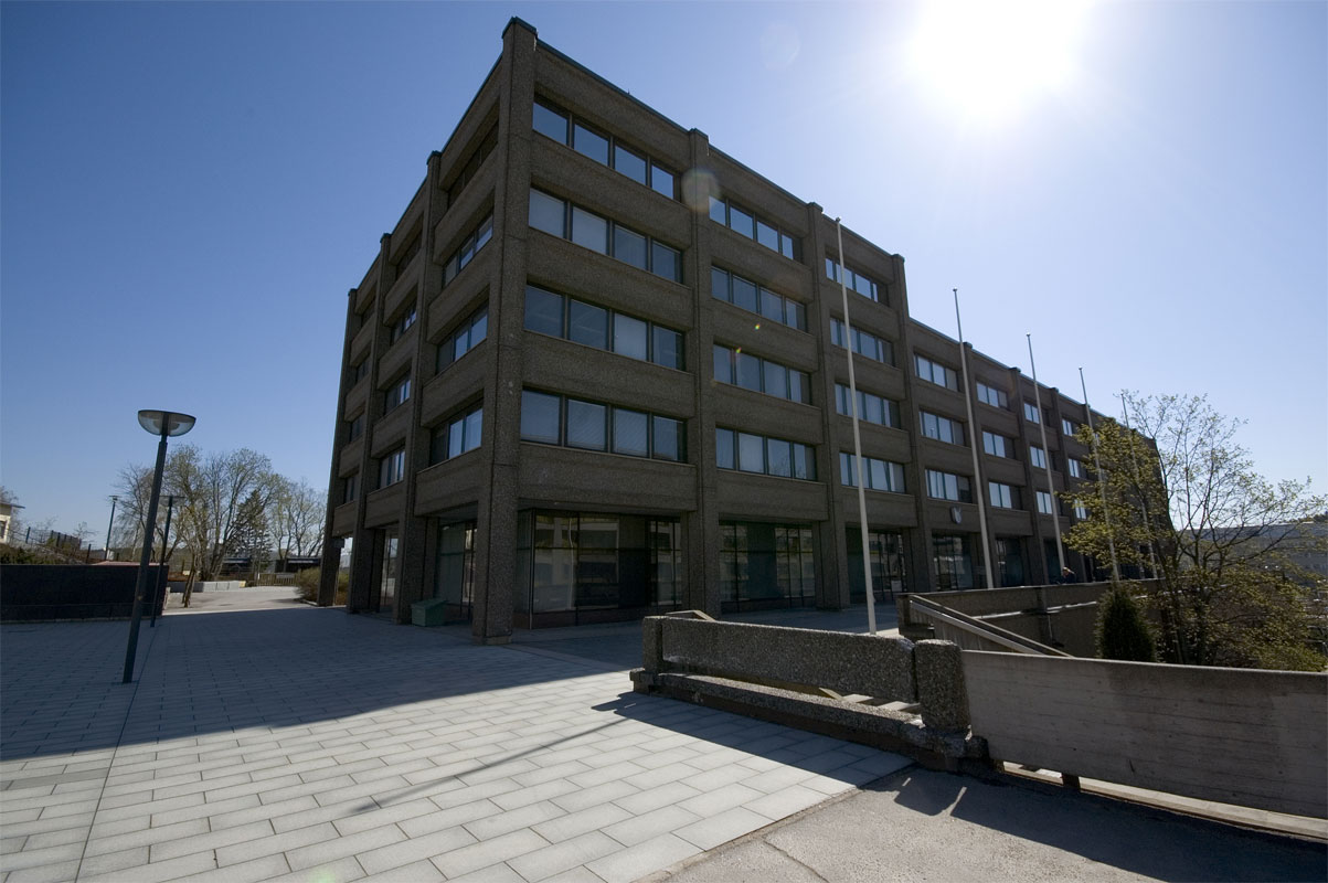 Espoon kaupungintalo